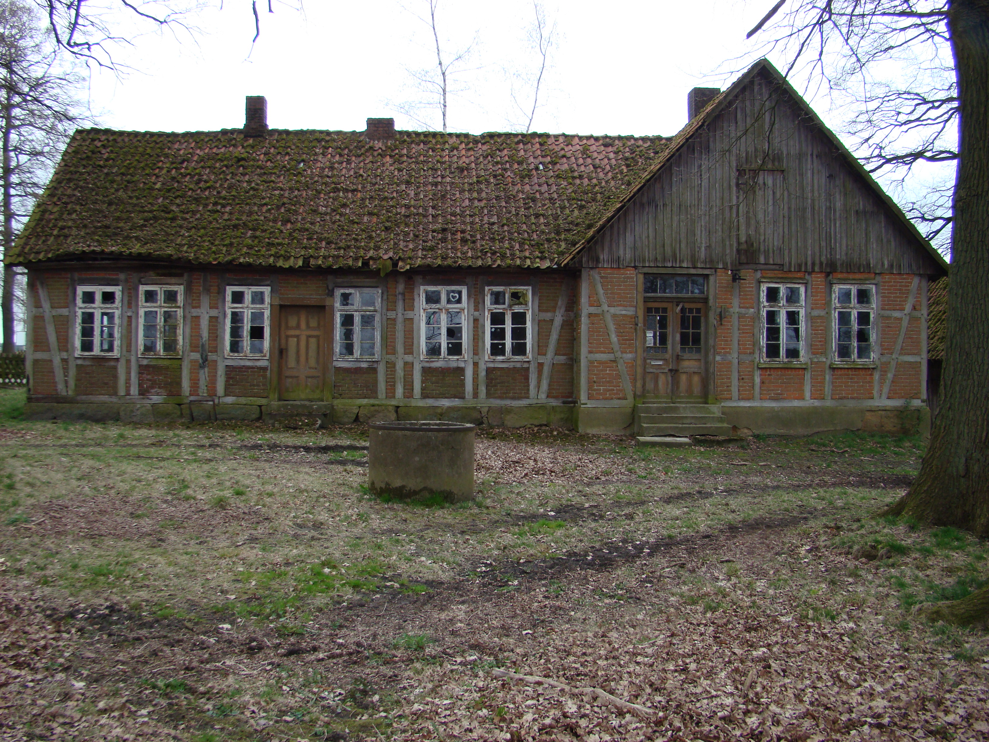 ehemaliges Häuslingshaus in Baven (Landkrs. Celle) - Das Haus wurde inzwischen abgerissen und auf dem Gelände des Heimatmuseums Hermannsburg wieder aufgebaut.